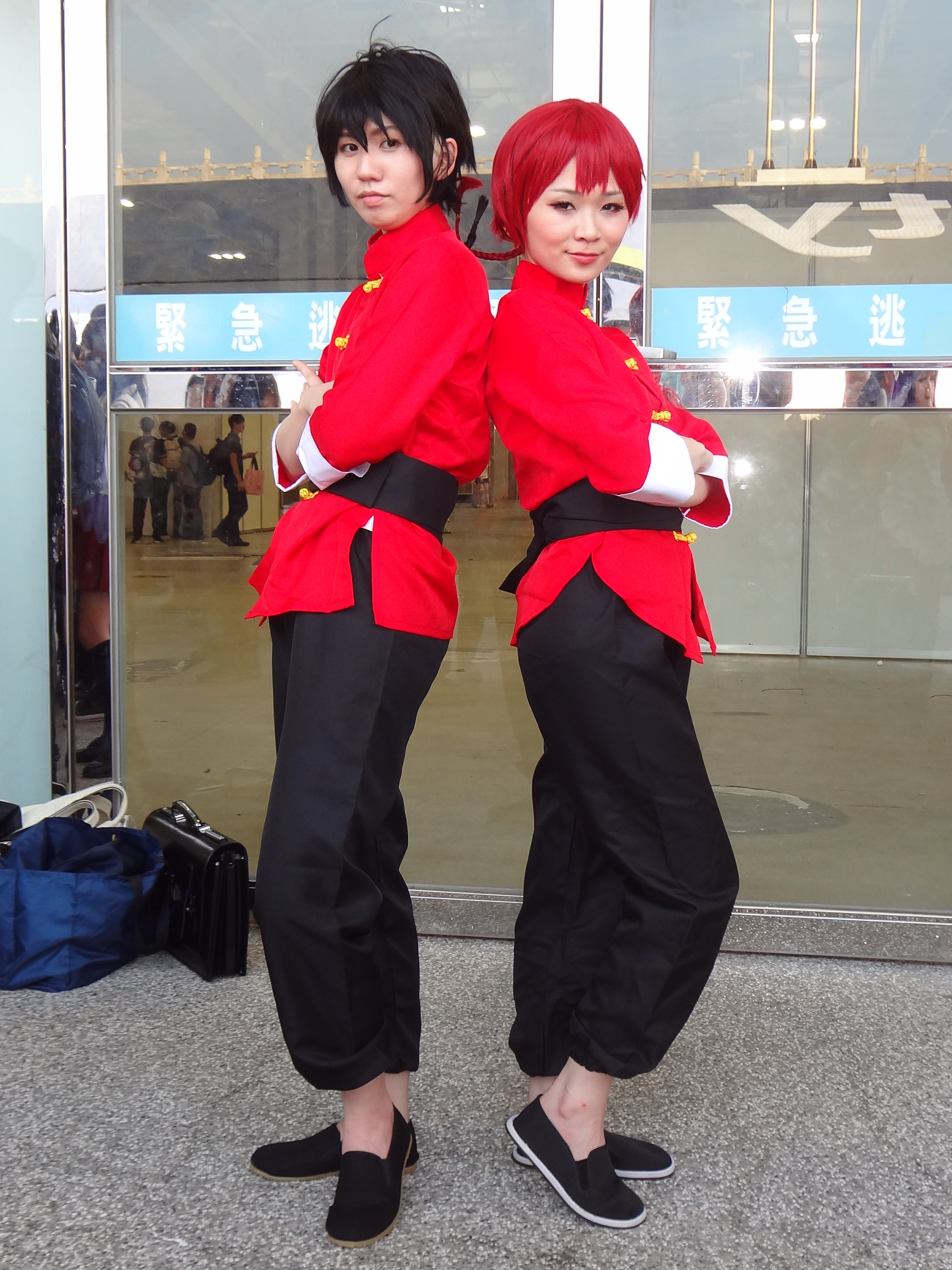 第28屆亞洲動漫創作展，《亂馬½》早乙女亂馬（男）、早乙女亂馬（女）cosplayer。